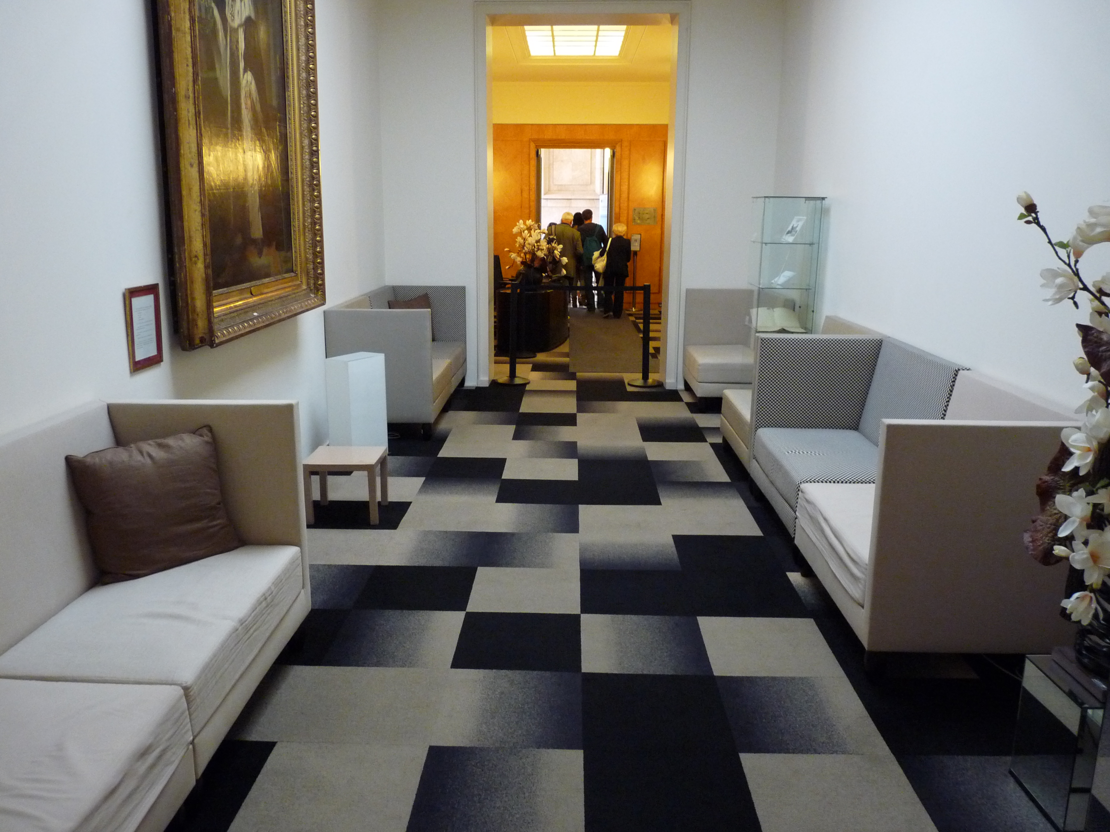 L'antichambre Putman de l'hôtel de Rochechouart à Paris, siège du ministère de l'éducation nationale. Photo prise lors des journées du patrimoine 2011.